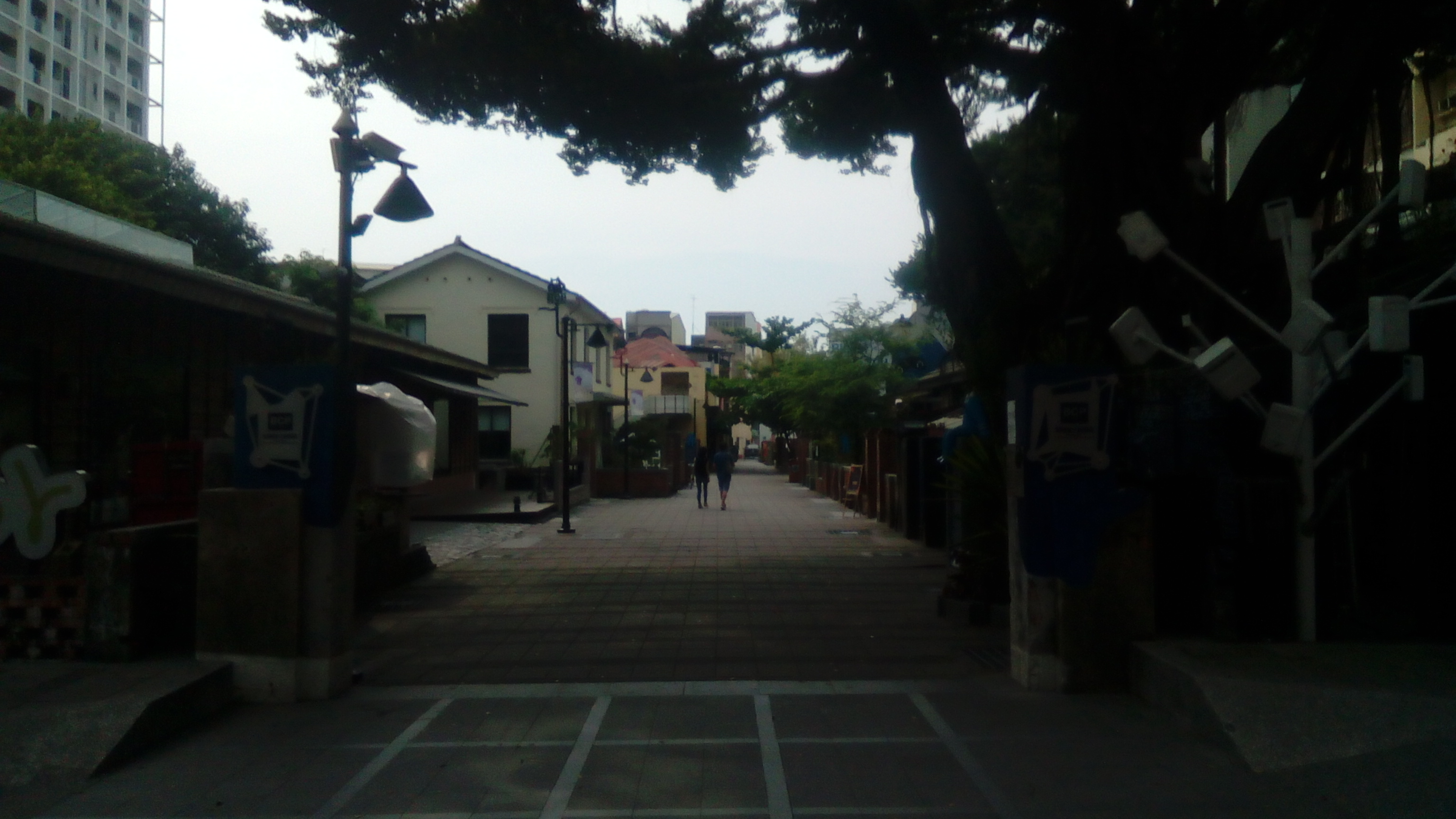 西門路上 新光三越新天地對面